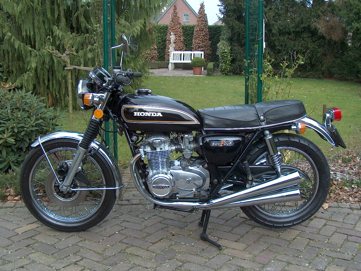 Honda CB500